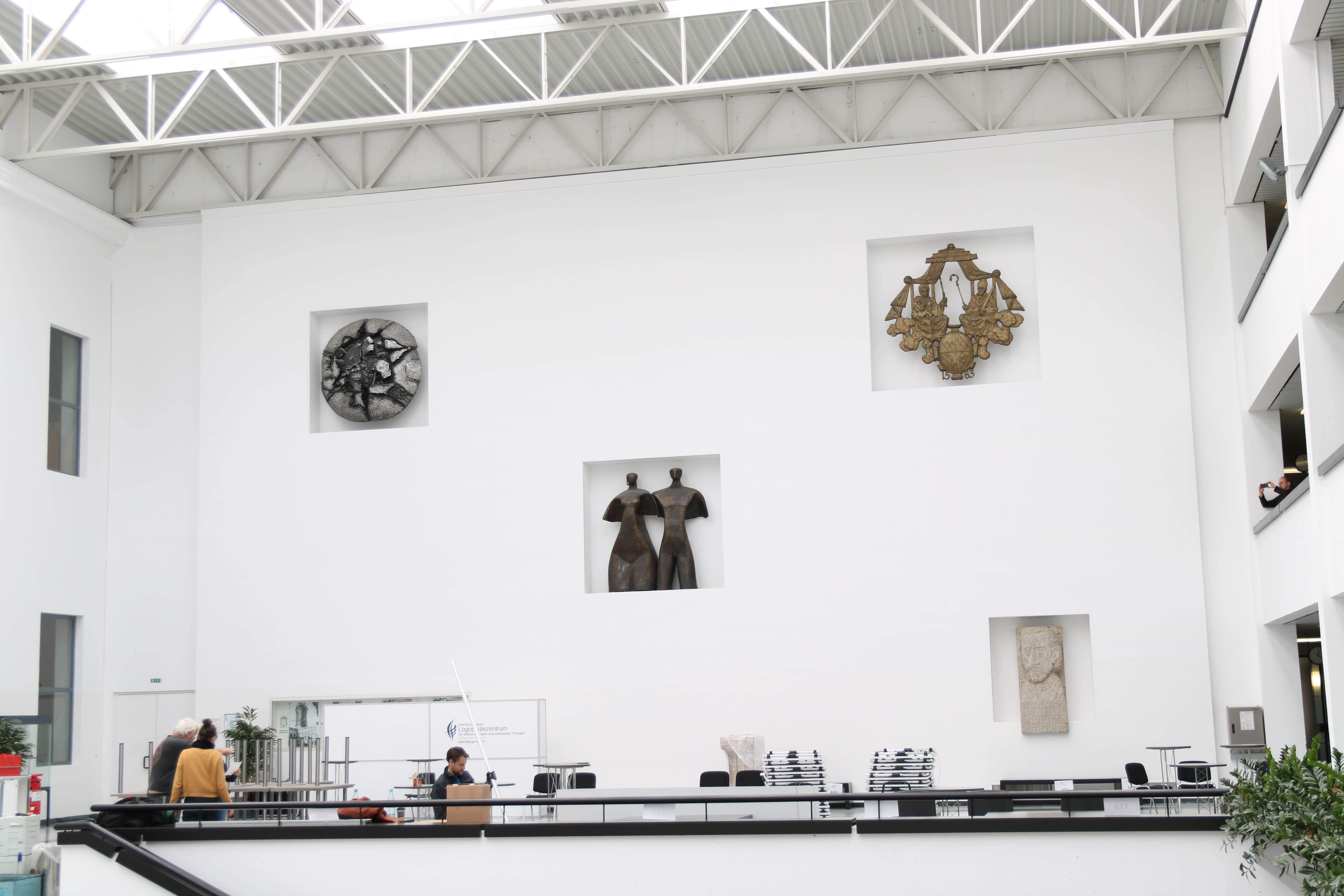 Foyer der Neuen Universität